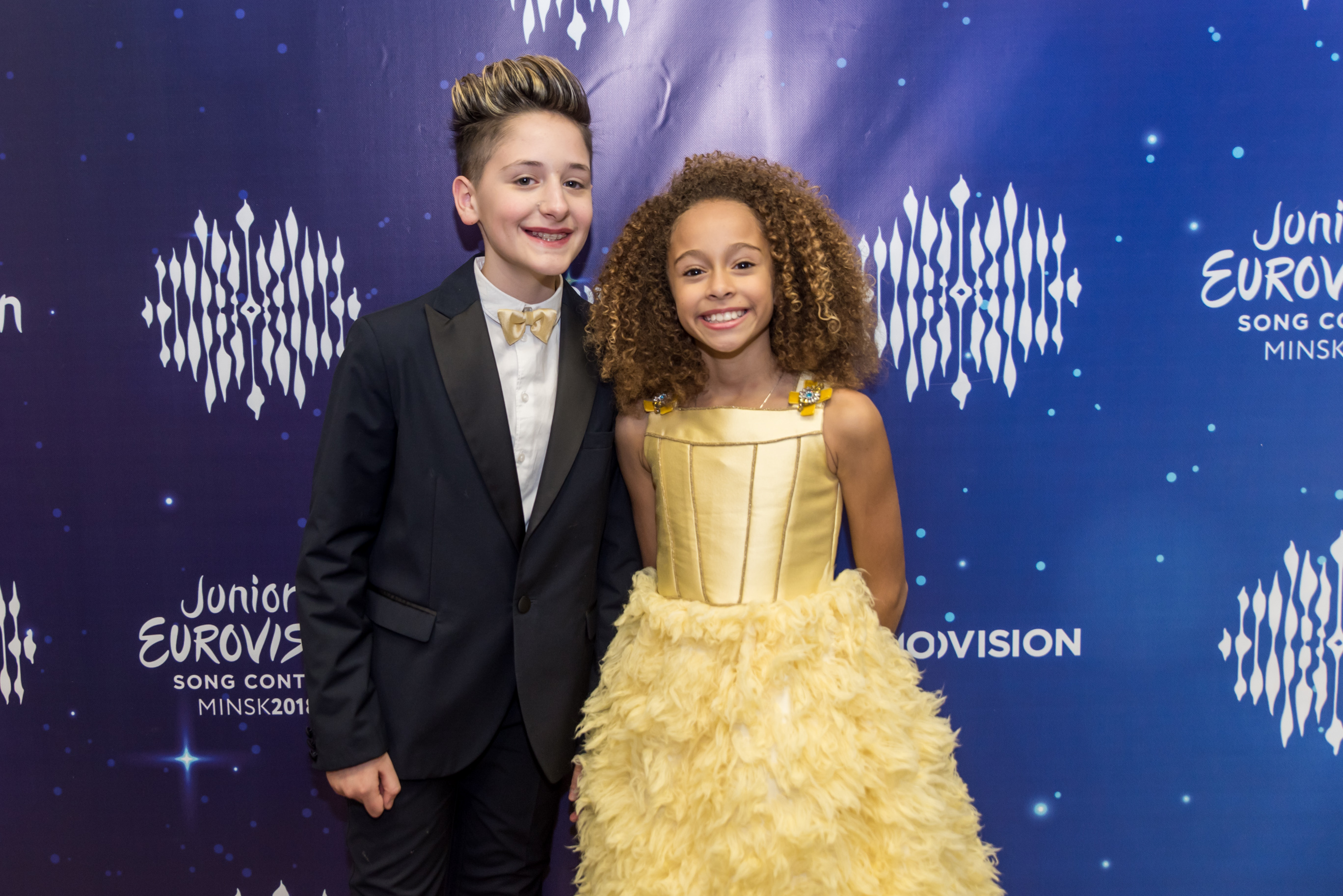 Детское Евровидение 2018. (Италия) Мелисса & Марко